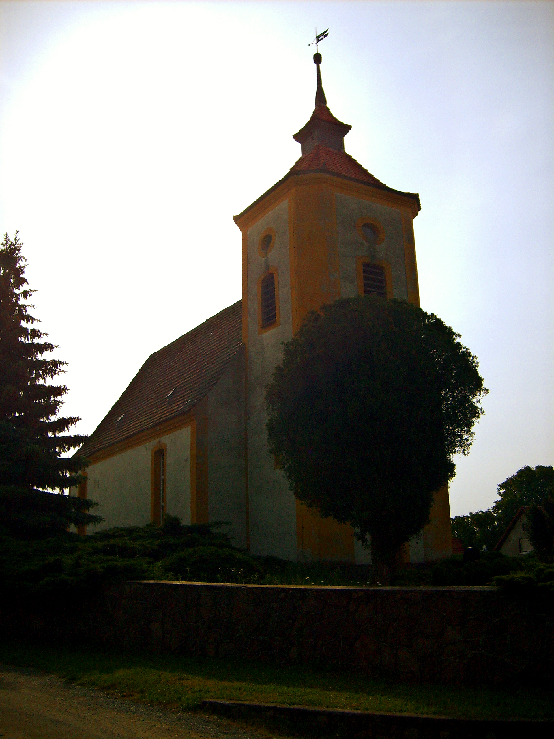 Dorfkirche Dreska